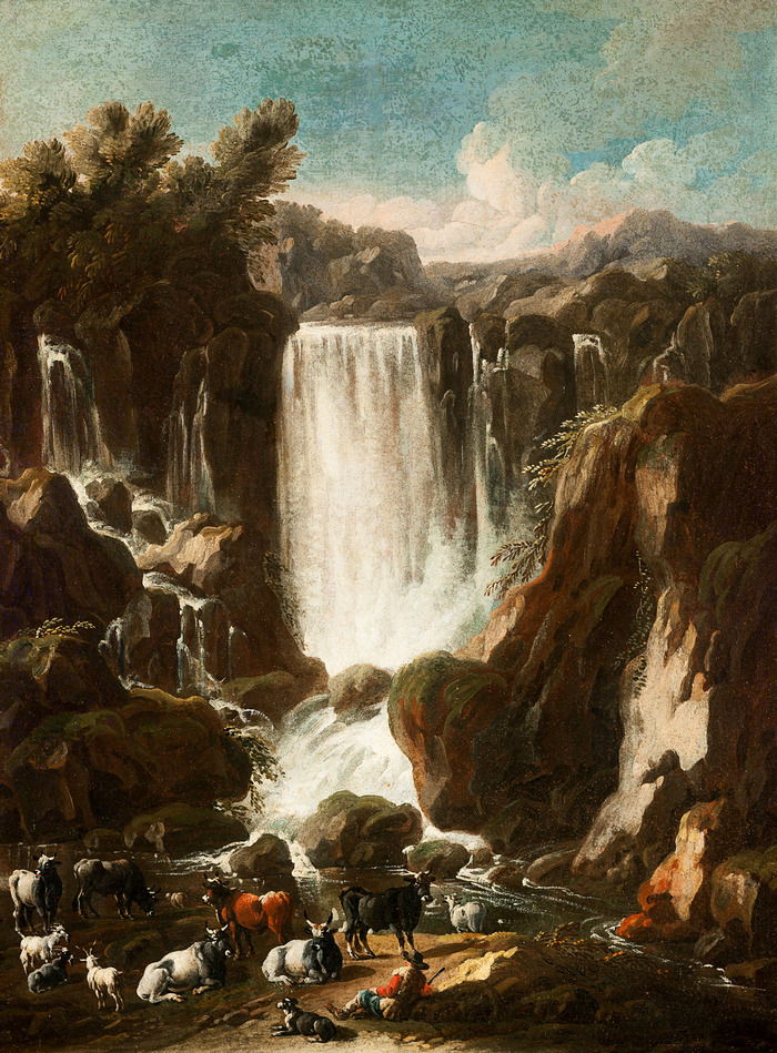 La obra, pintada a finales del siglo XVII, muestra la gran cascada de la ciudad italiana de Tívoli.